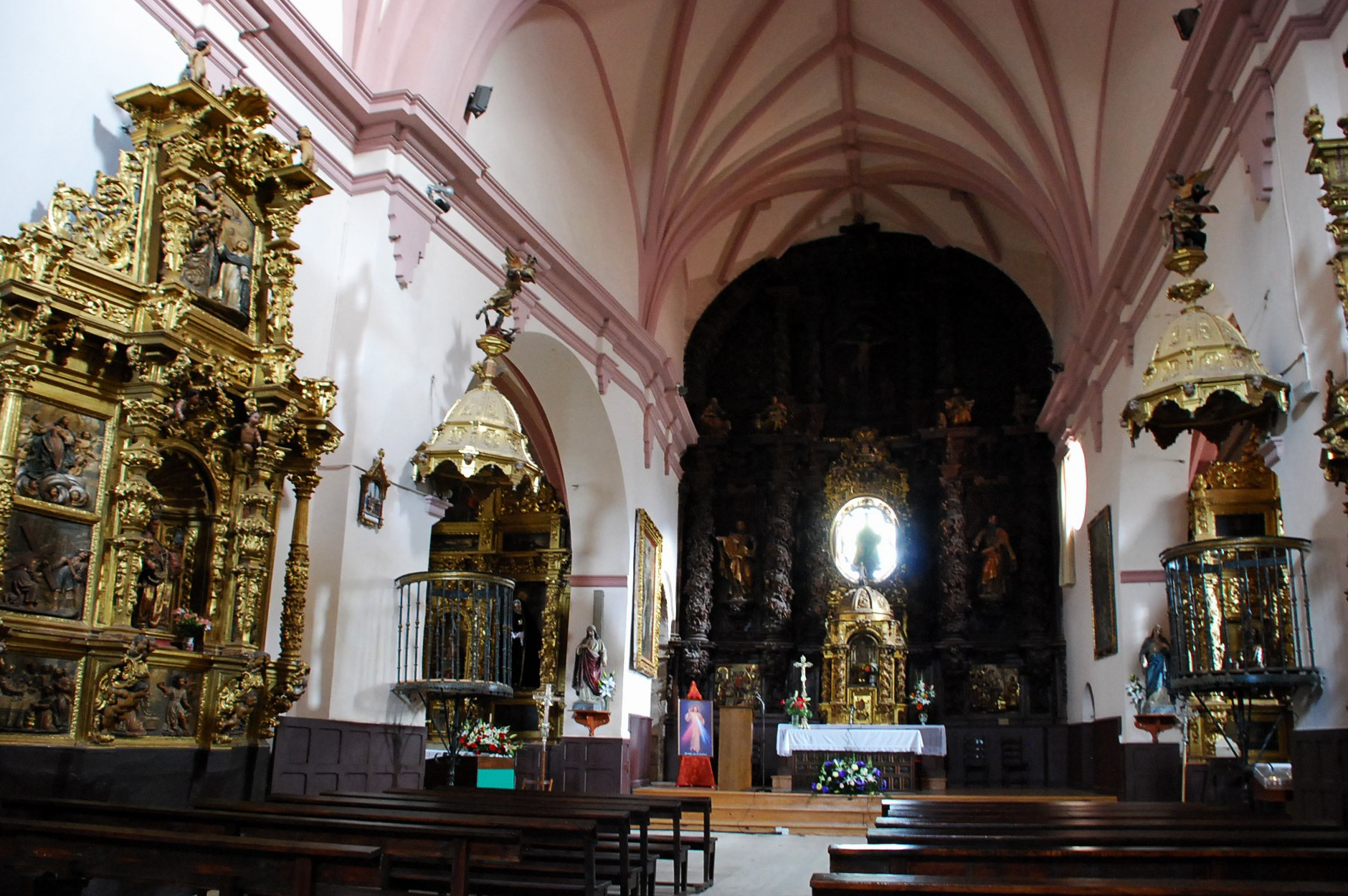 Interior de la iglesia de Villoslada de Cameros (La Rioja), España.